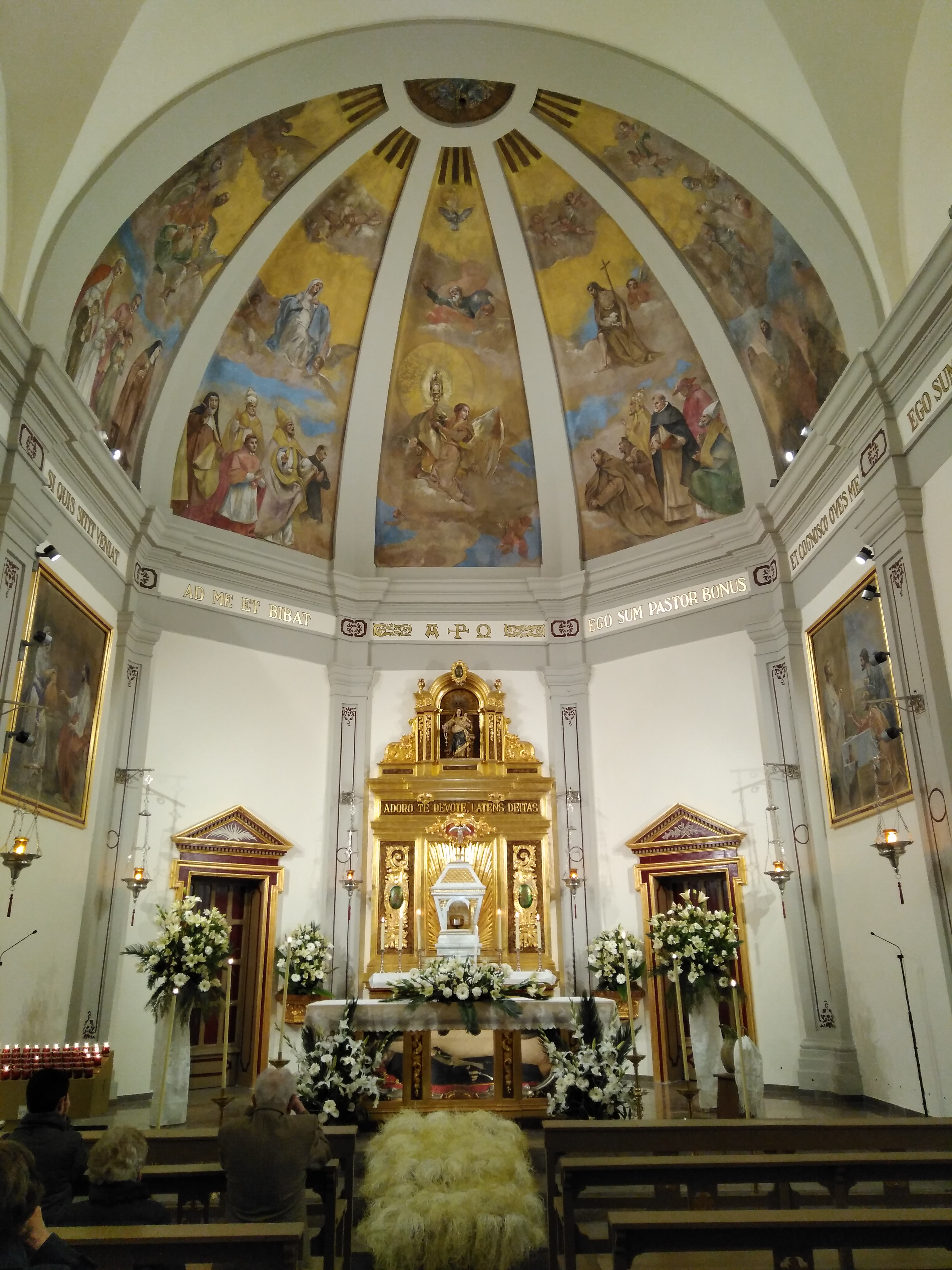 Capella Santíssim de l'església de Sant Jaume de Riudoms